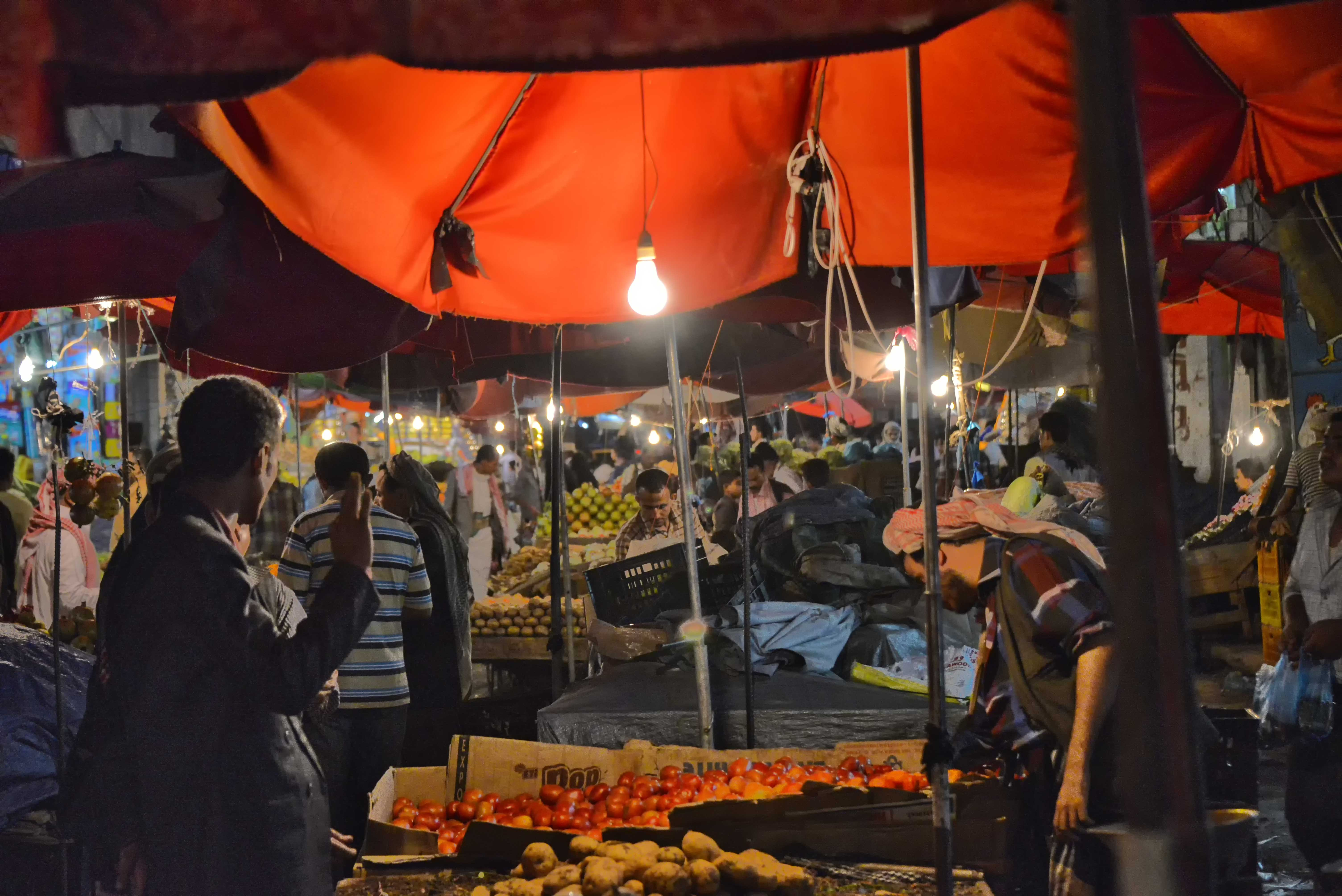 Al Hudaydah Market, Yemen